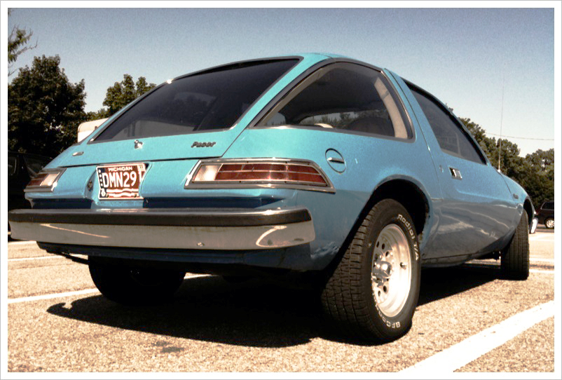 AMC Pacer le 2 Septembre 2009 à Downtown Clawson, Clawson, MI, US.